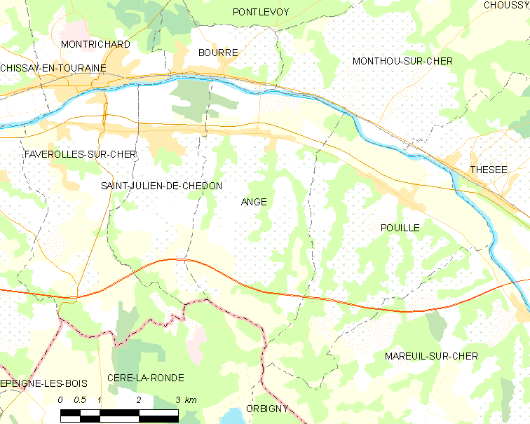 Carte des communes de France, centrée sur Angé (Loir-et-Cher, France, code Insee 41002)